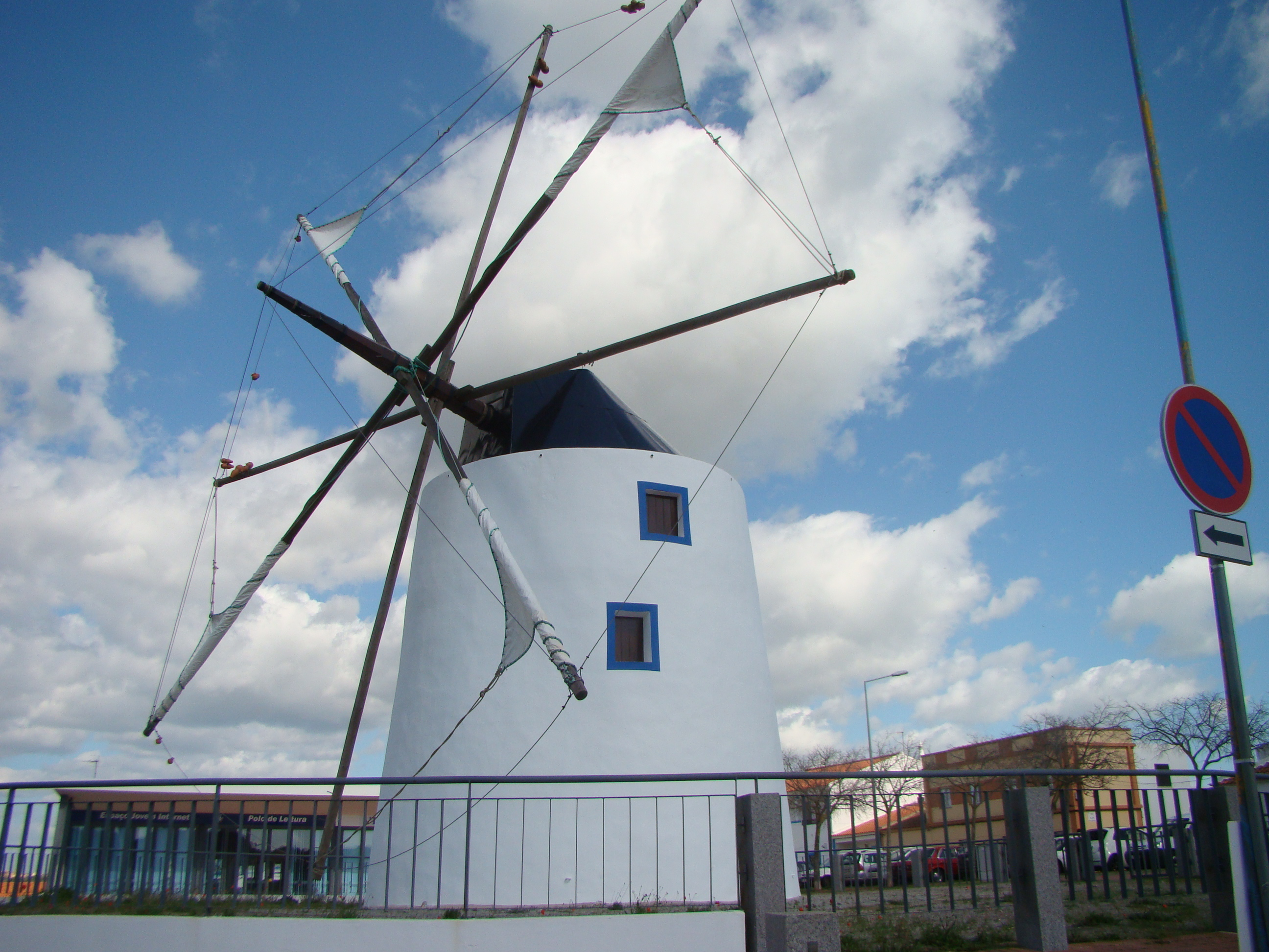 Moinho tipicamente algarvio em Odiáxere, Lagos, em Março de 2018.